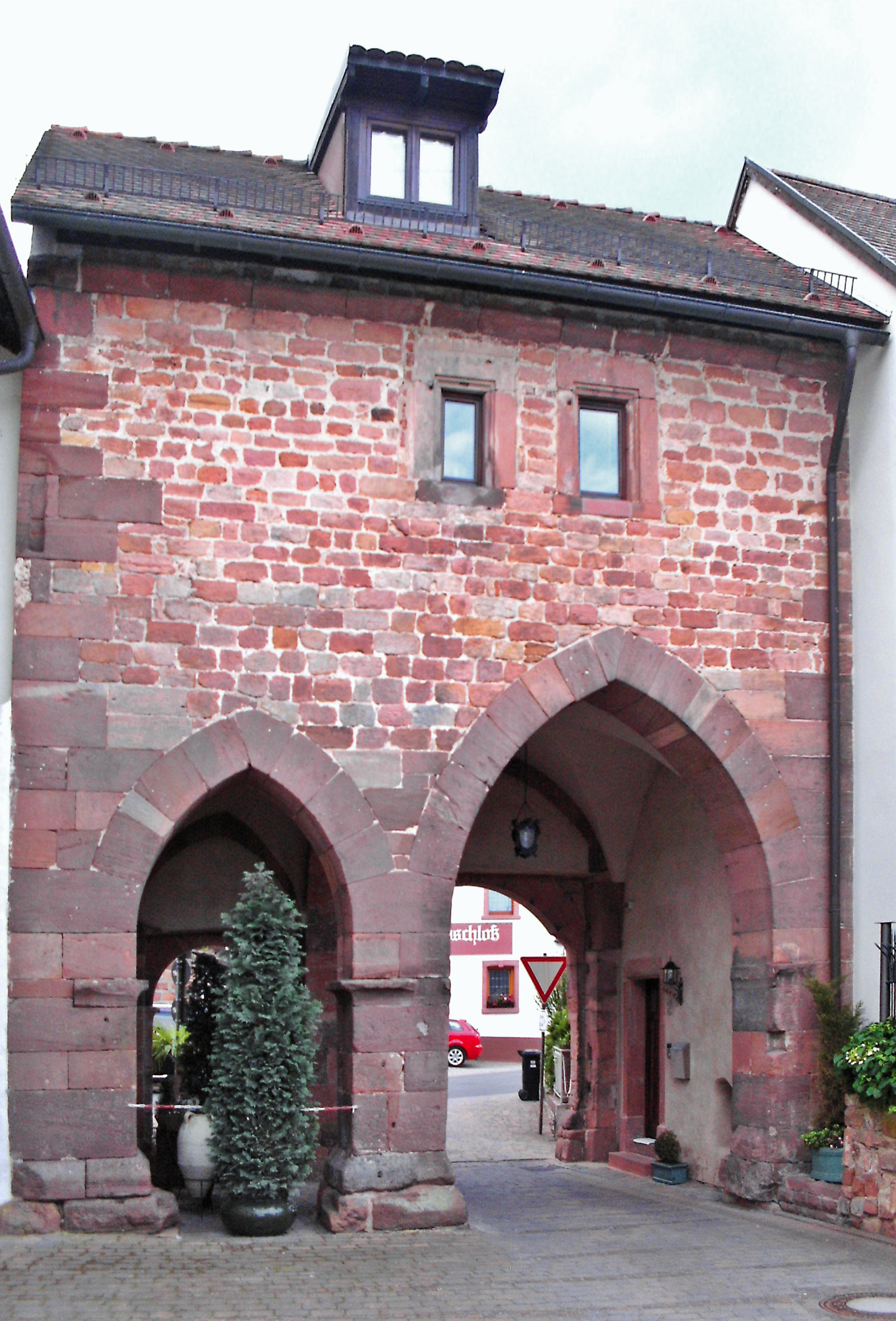 Kloster Höningen, Pfalz, Torhaus im Innenbereich, neben dem ehem. Konventsgebäude